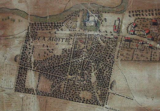 Domaine de Château de La Motte-Tilly — La Motte-Tilly. Champagne-Ardenne, FR.